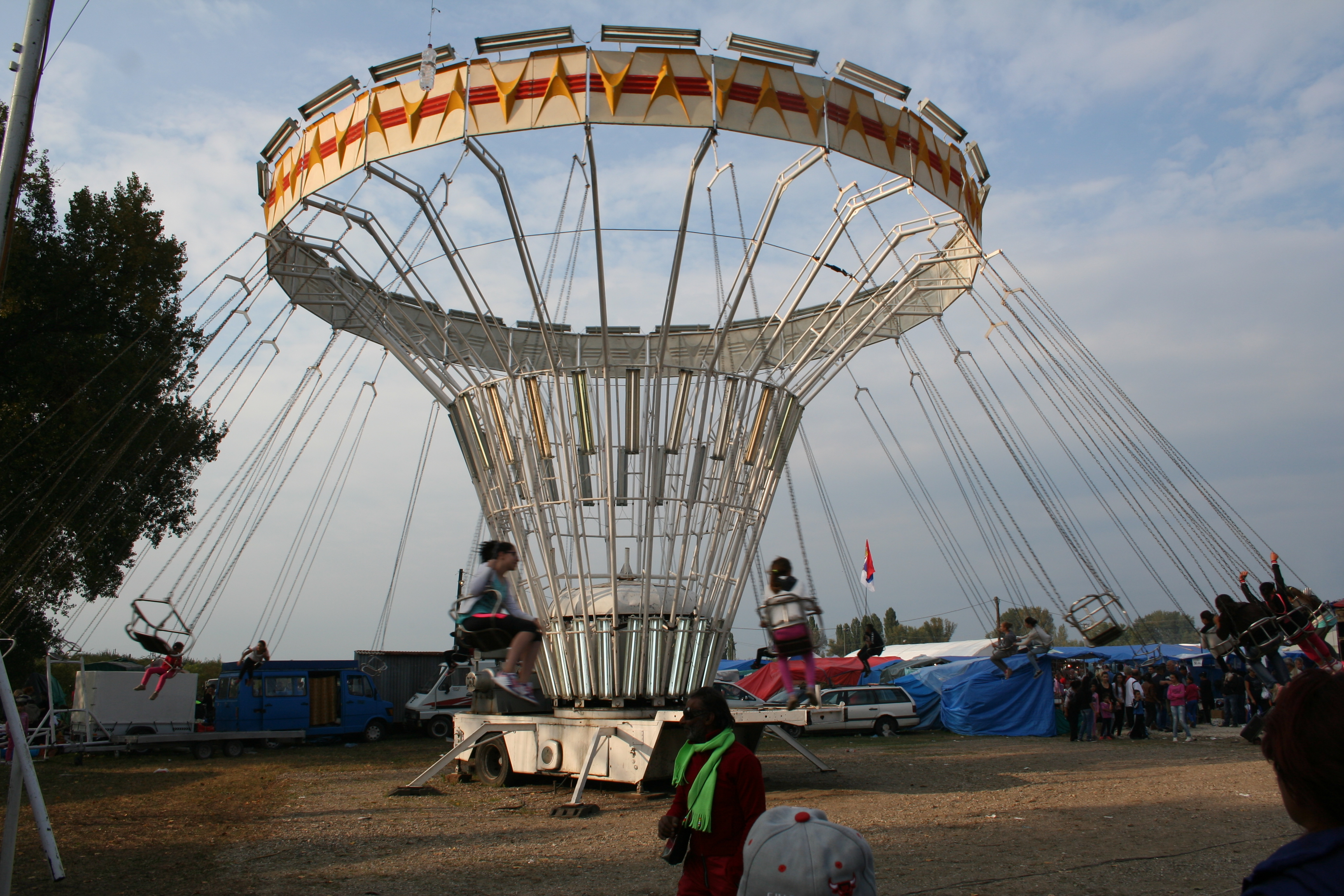 Šabački malogospojinski vašar 2016, Šabac